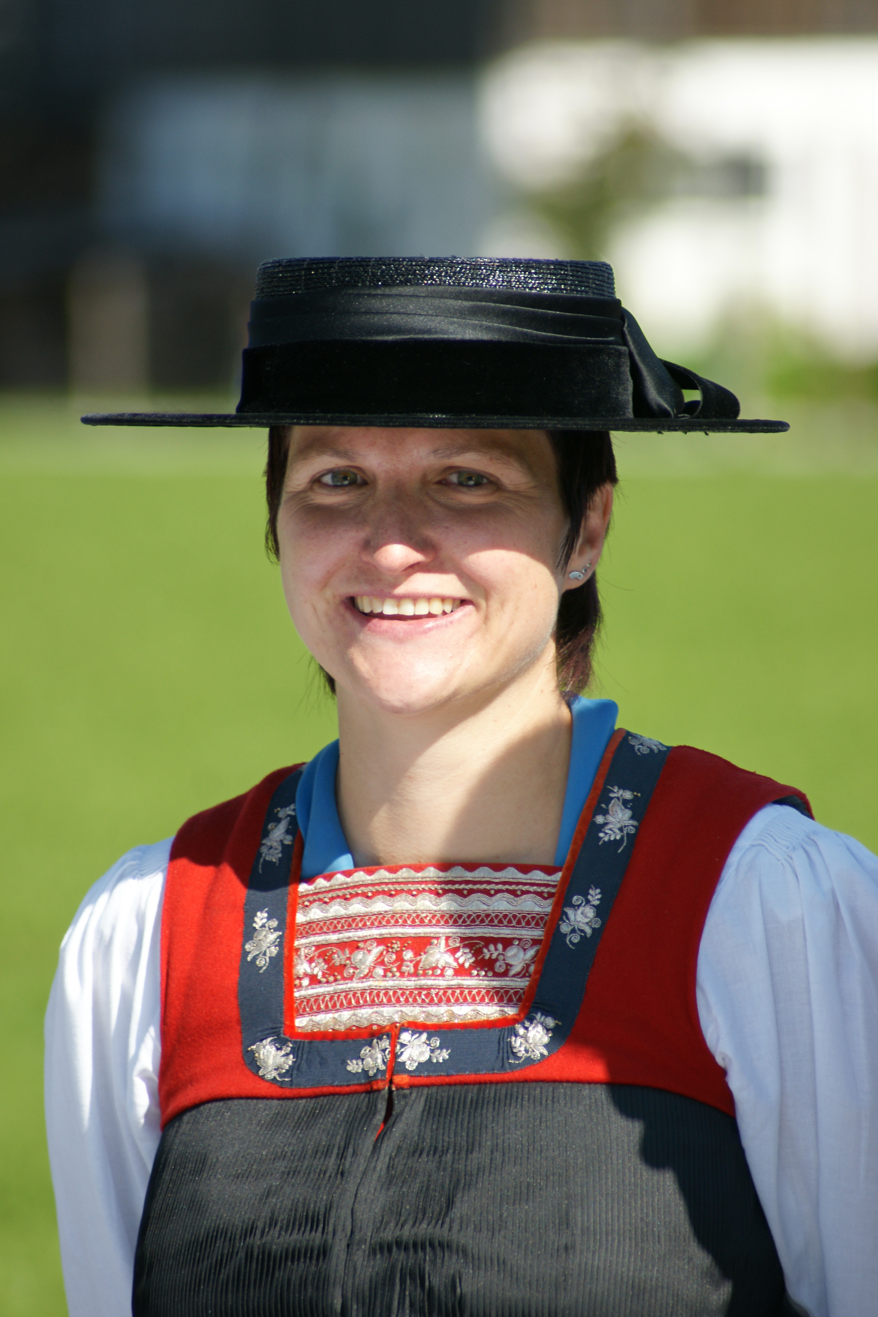 Die Merkmale der Bregenzerwälder Frauentracht (der Juppe) sind, die silberne Schnalle, der "Bleotz", welcher kunstvoll mit gold-silbernen Stickereinen versehen ist, der "Keadoro", ein kunstvoll goldsilberner bestickter Zierstreifen am Rücken und die verschiedenen Kopfbedeckungen. Sie sind ein ganz besonderes Markenzeichen der Wäldertracht. "Spitzkappe (für den Kirchgang)", "Brämokappo (Pezlkappe aus Seehundfell)", "Stuoz", "Stucho (weisses Haartuch für die Trauer)", "Schäohut (Strohhut, Sommer)", "Kauffmannhut (Filzhut, Übergangszeit)" und als Meisterstück das "Schappale (Trachtenkrönele, Krönchen oder Flitterkrone)".